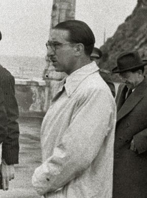 Título original: Visita de diferentes autoridades a San Sebastián, entre ellas se encuentran Tomás Garicano Goñi (gobernador civil de Gipuzkoa) y Avelino Elorriaga Zabala (presidente de la Diputación de Gipuzkoa) (10/10) Localización: San Sebastián (Guipúzcoa)